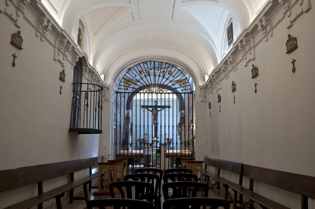 Ermita del Cristo de los Doctrinos. Alcalá de Henares.